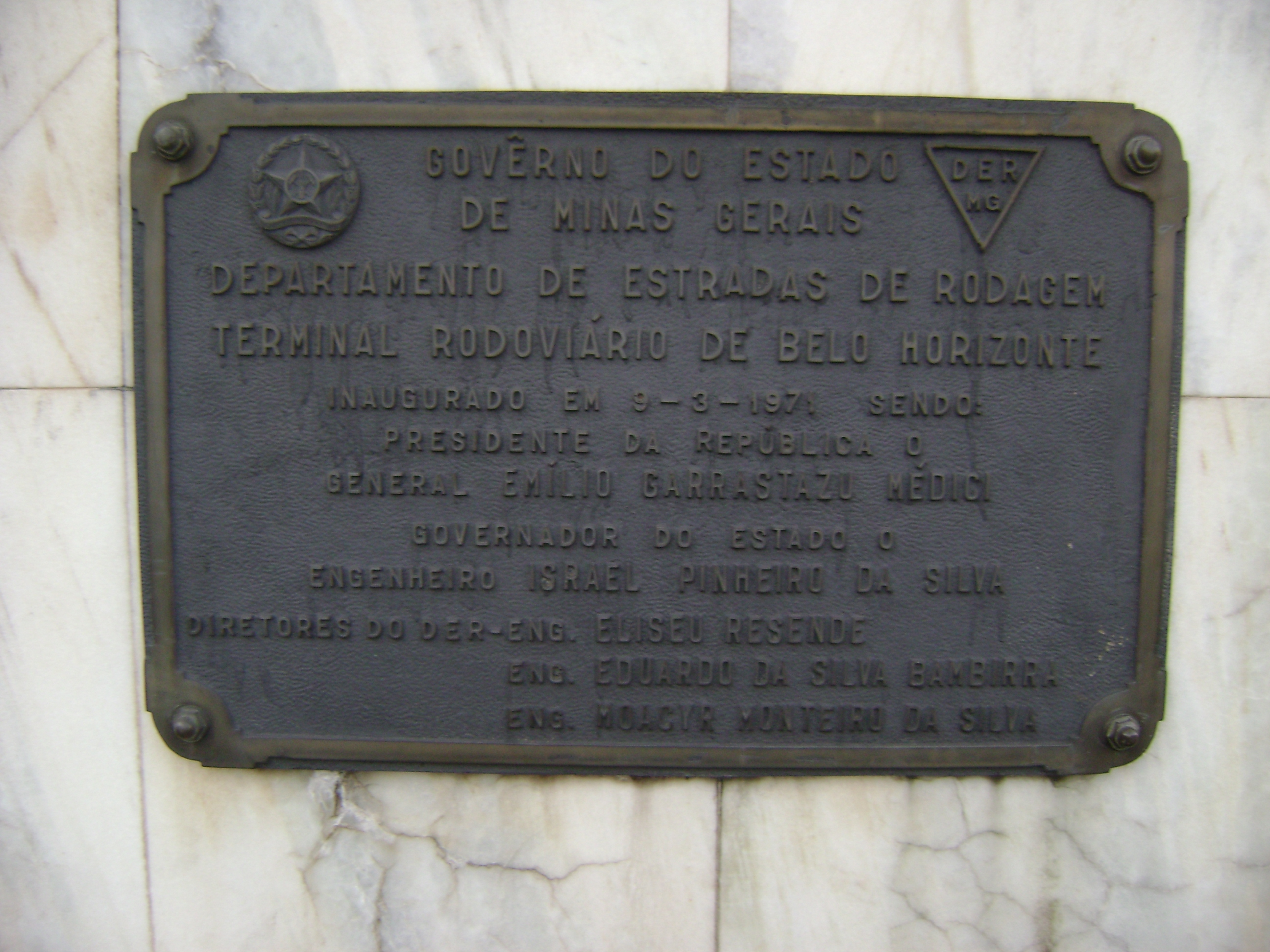 Placa na estação rodoviária de Belo Horizonte, Brasil.